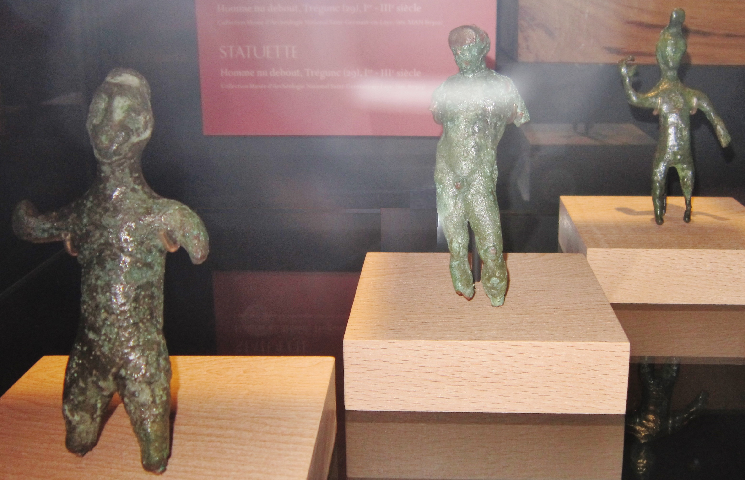 Trois statuettes d'hommes nus debouts d'époque gallo-romaine trouvées à Trégunc (entre le 1er et le 3e siècle après J.-C.) [Musée d'archéologie national de Saint-Germain-en-Laye, exposition "L'empreinte de Rome, musée de Douarnenez].